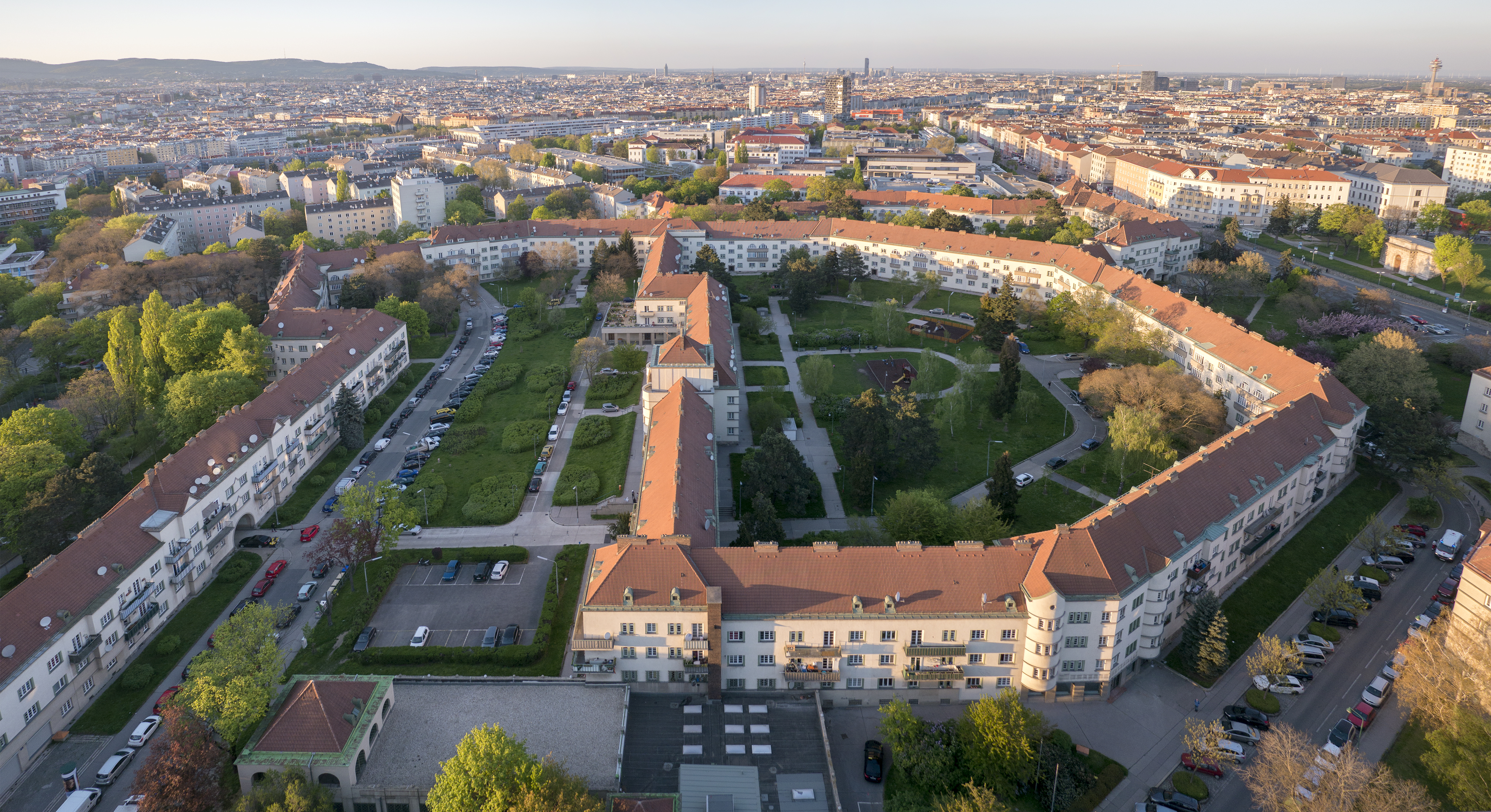 George Washingthon Hof von oben